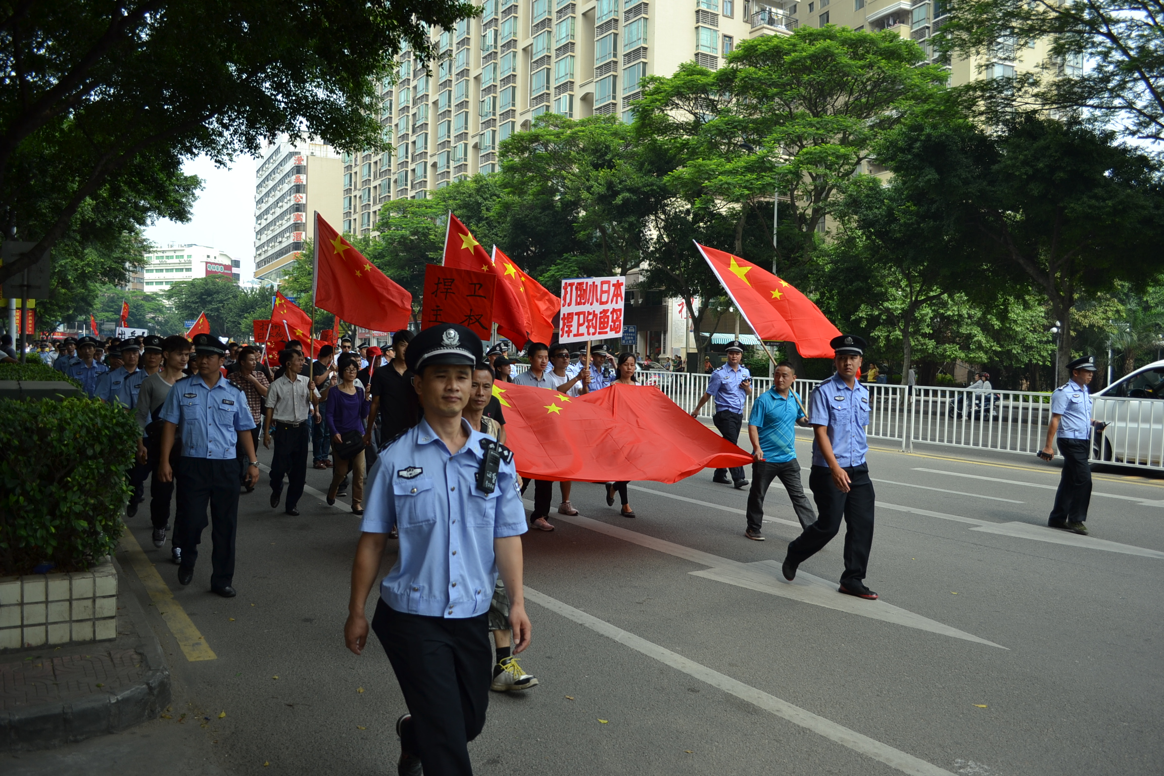 中文（中国大陆）: 2012年9月18日上午在广东省惠州市有群众参加纪念九一八事件的反日游行